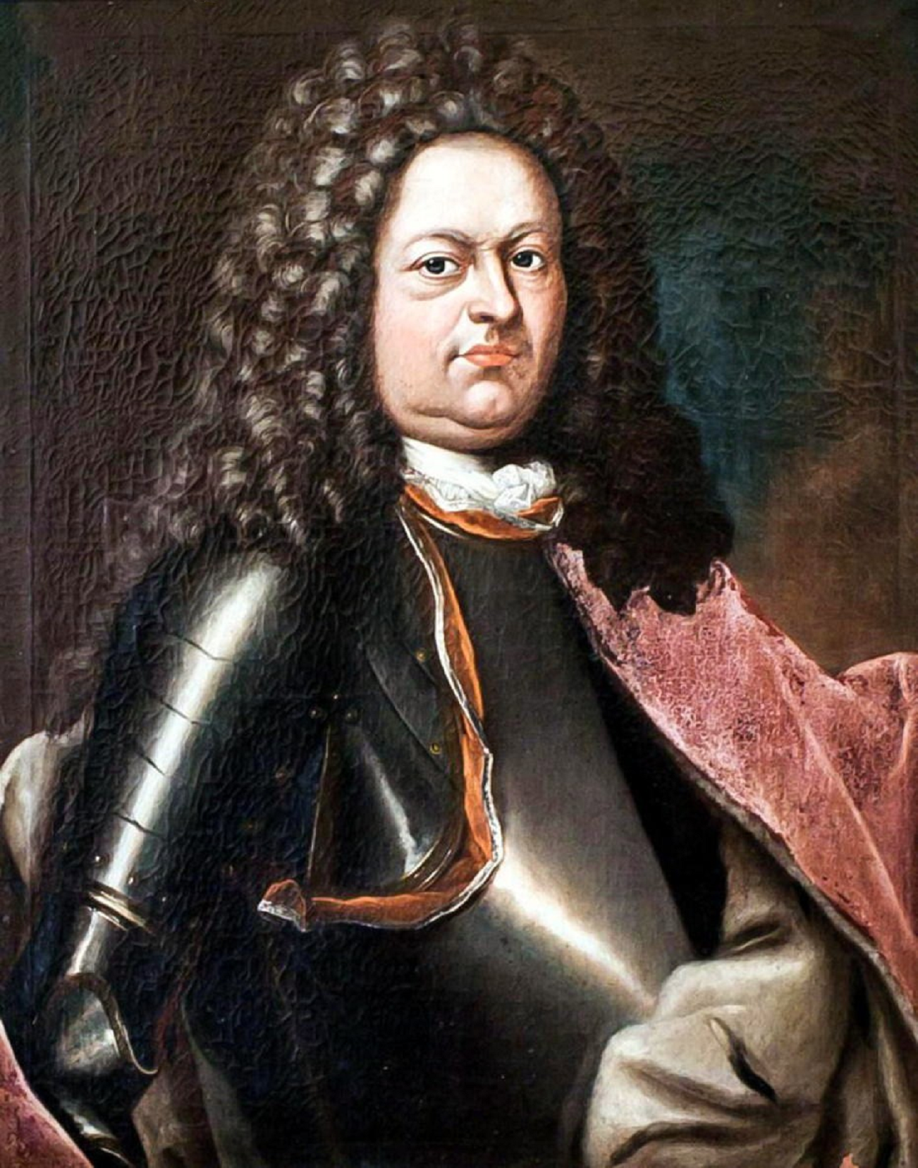 Portrait Johann Ernst, gefürsteter Reichsgraf von Nassau-Saarbrücken-Weilburg * 13. Juni 1664 in Weilburg; † 27. Februar 1719 in Heidelberg